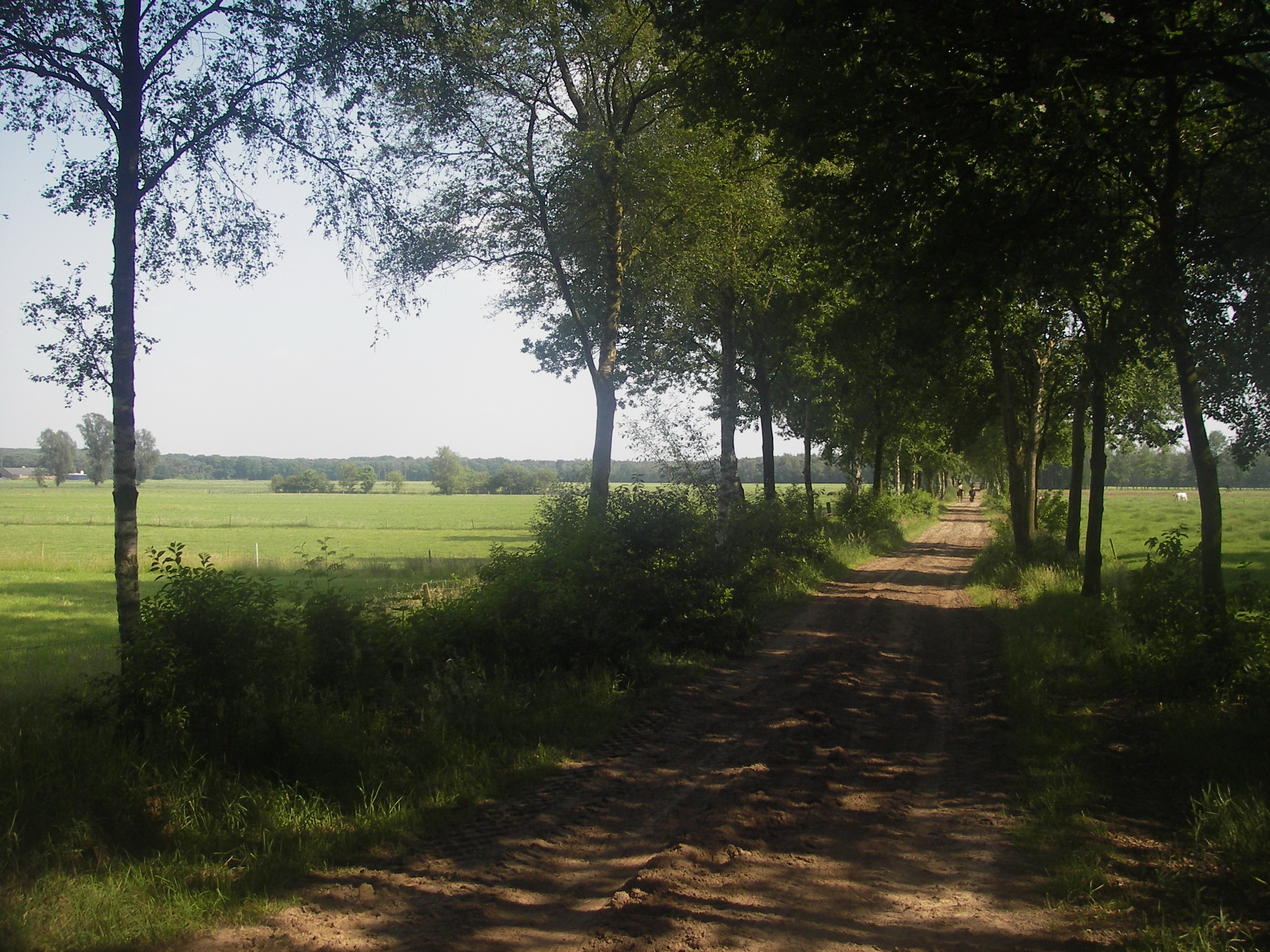 Graslanden in het voormalige Meerven bij Lierop.